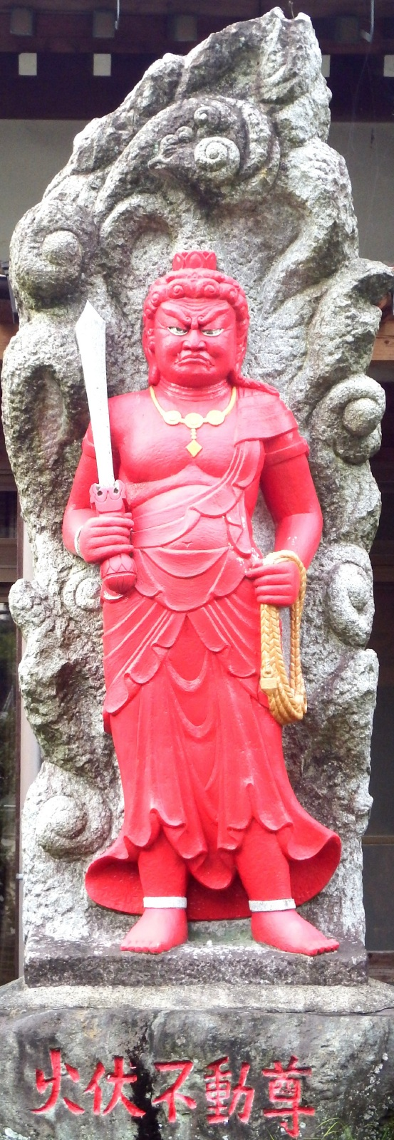 椿堂常福寺の不動尊